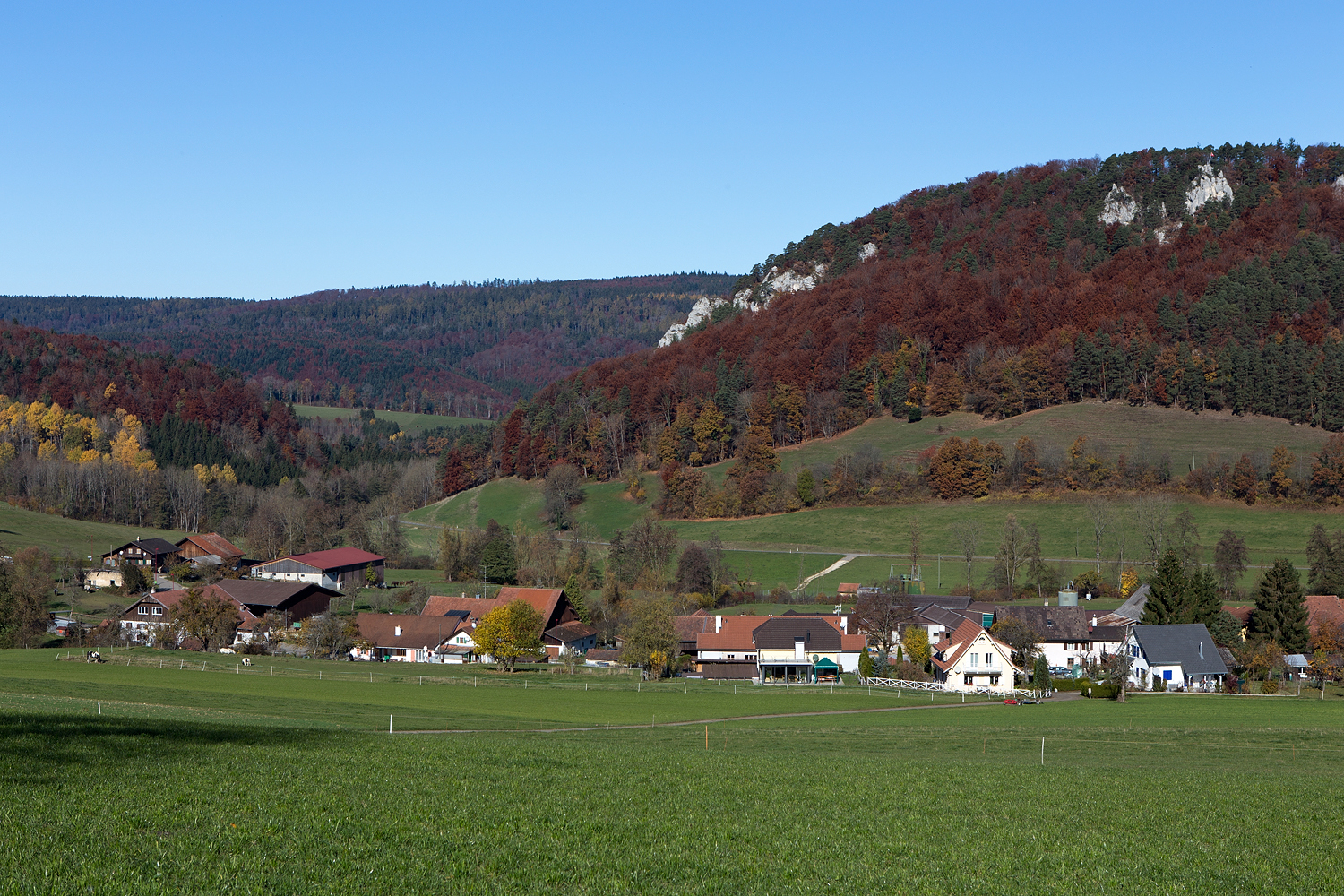 Blick auf den westlichen Dorfteil von Ederswiler (JU)